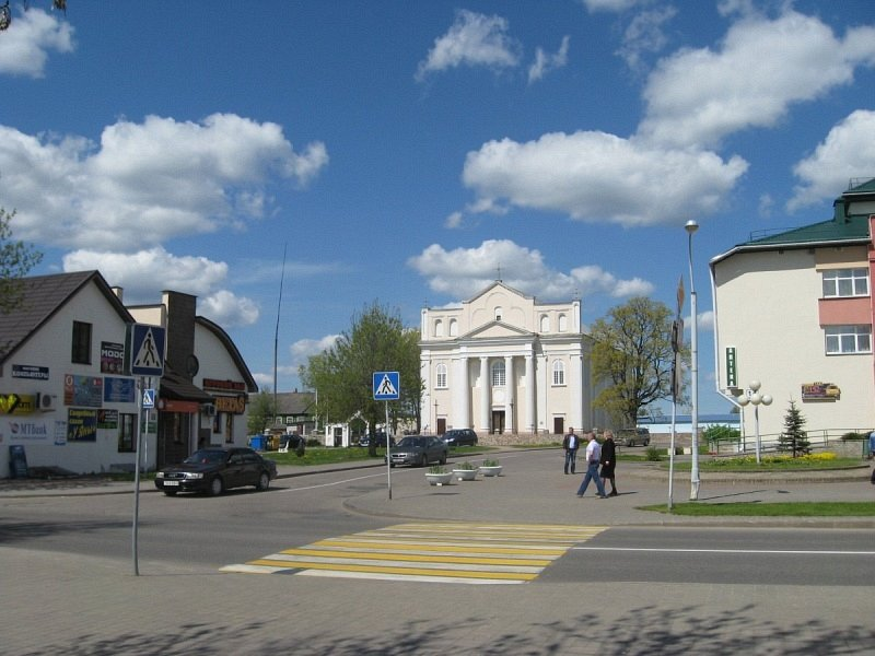 Астравец. Касцёл Святых Касмы і Даміяна